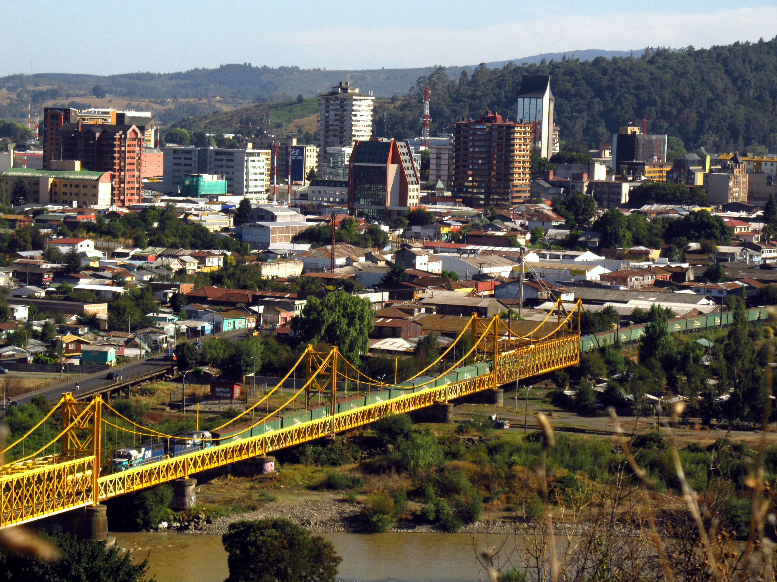 Con el hermoso Puente Cautín, un trencito, y la gran ciudad de fondo.